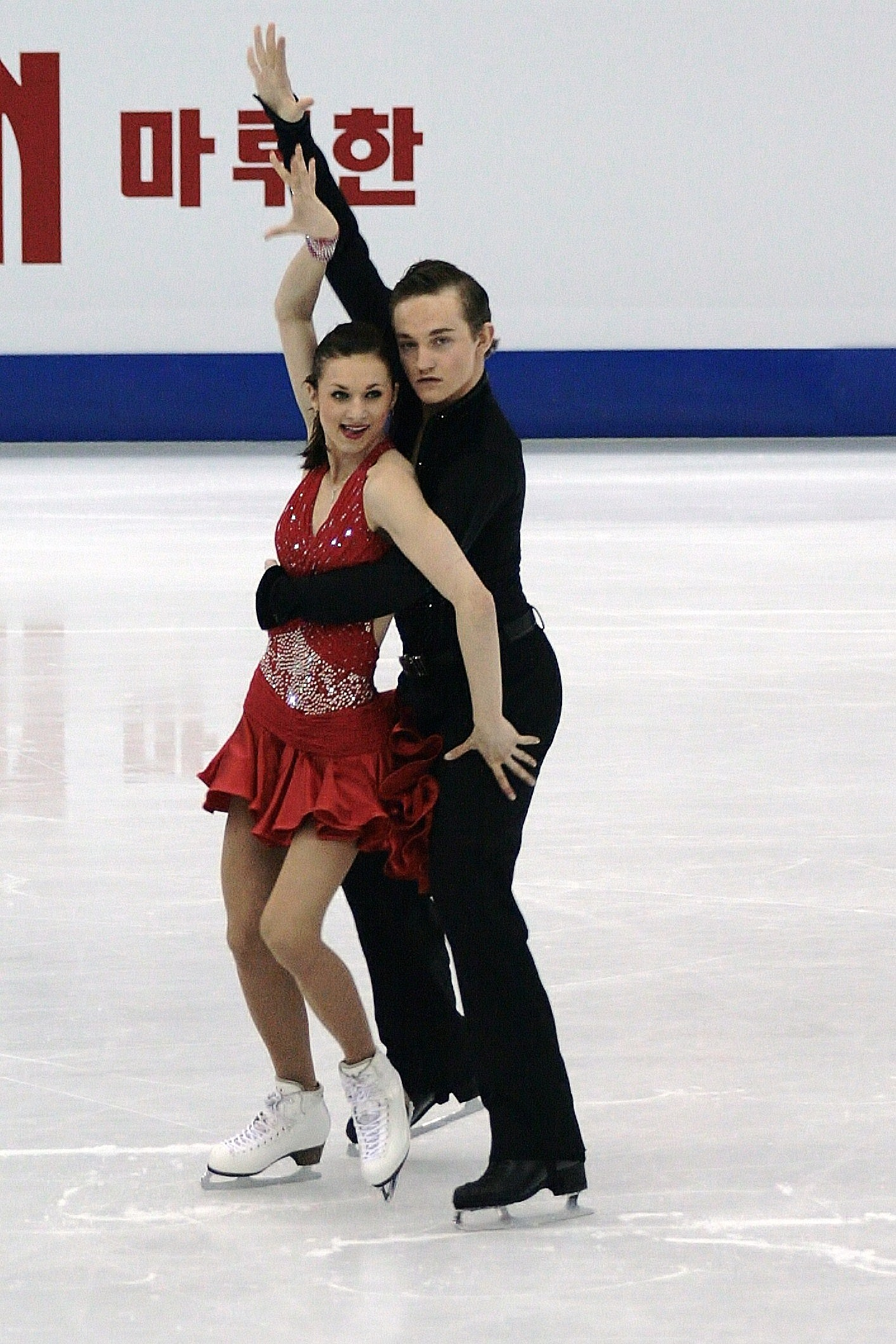 Ирина Шторк и Таави Ранд (Эстония) на чемпионате мира по фигурному катанию 2012.